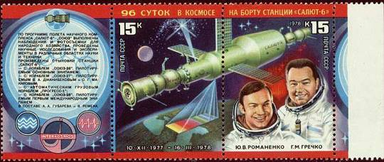 Космонавты СССР Романенко и Гречко